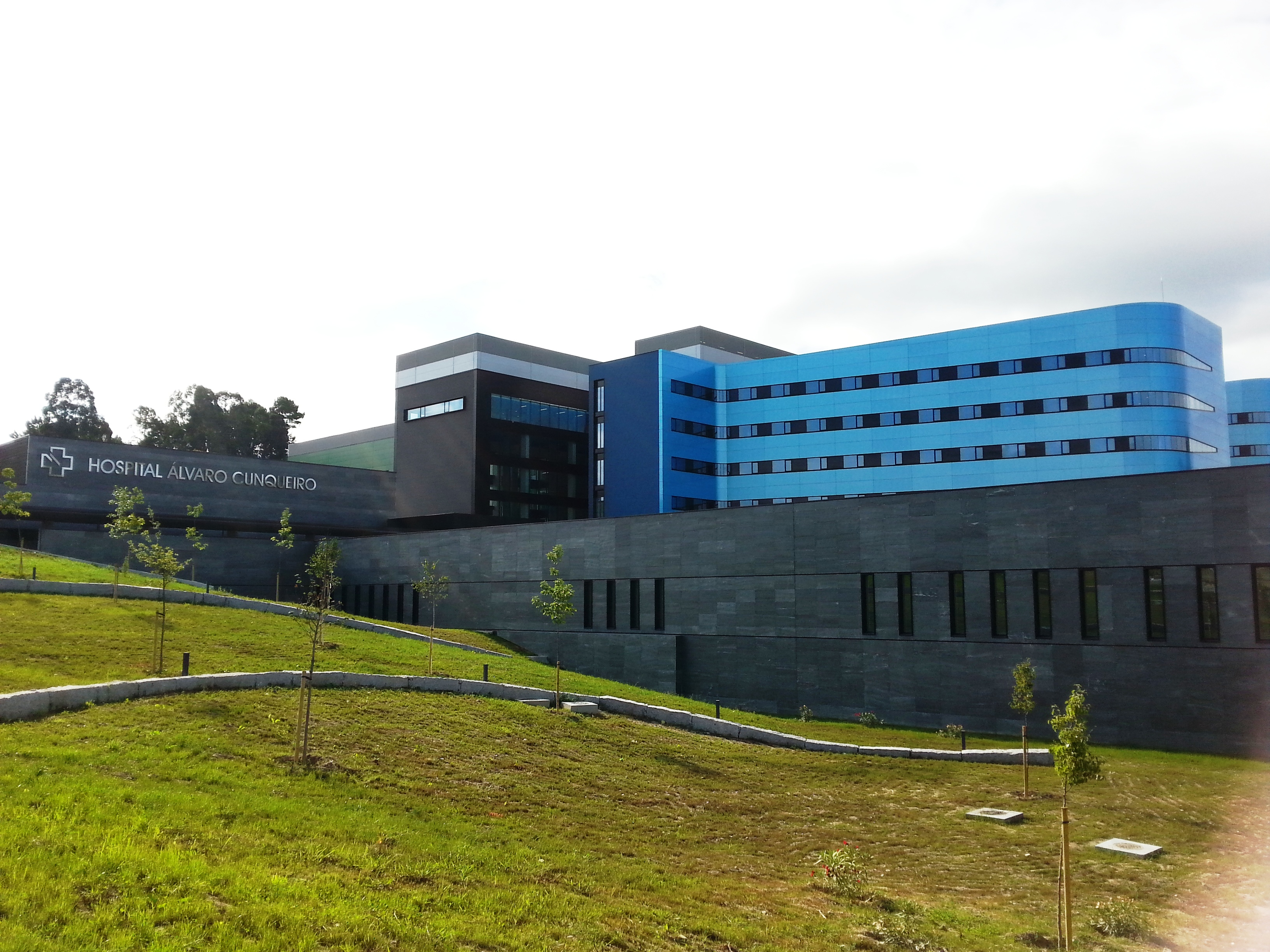 Hospital Álvaro Cunqueiro